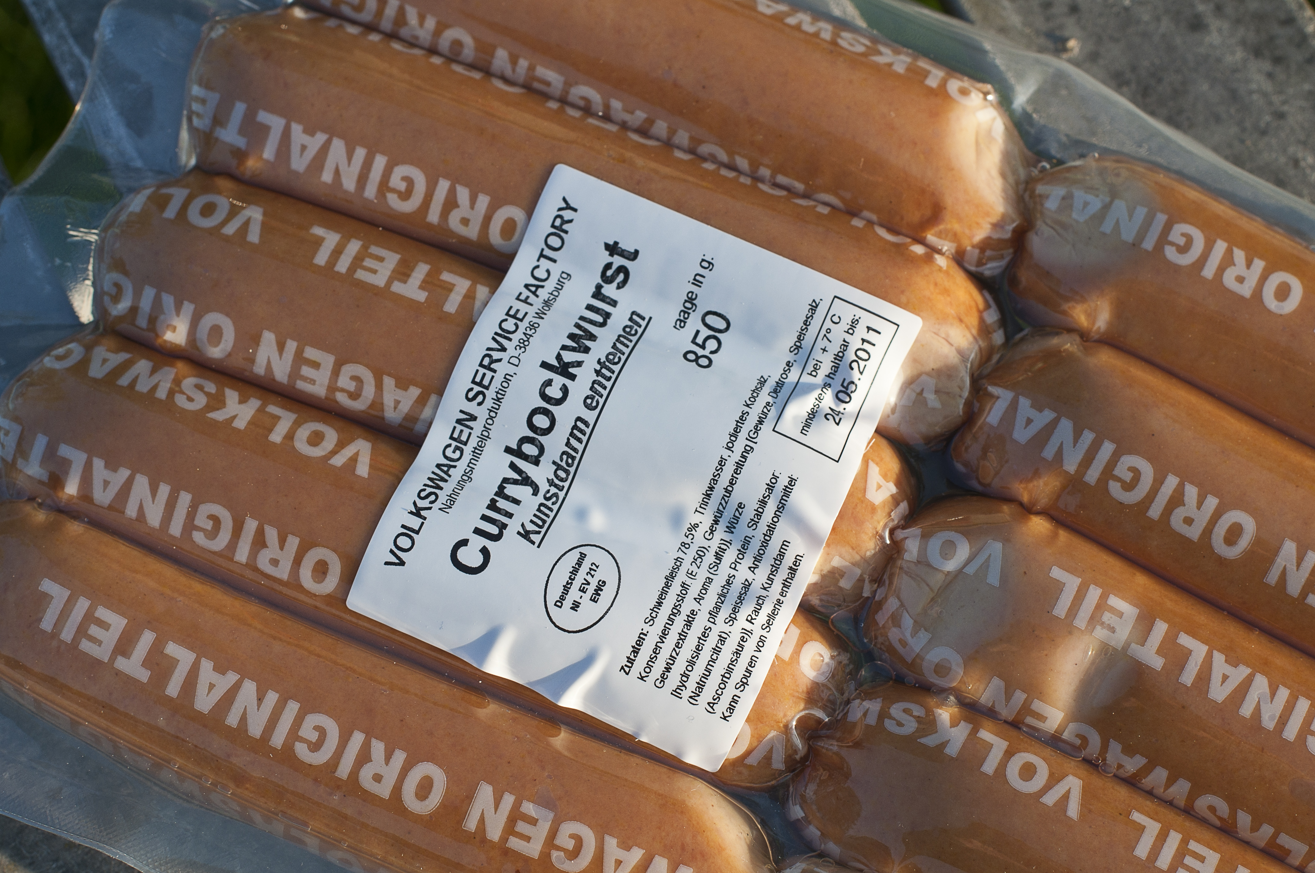 Originalteil Volkswagen: die Volkswagen Currywurst